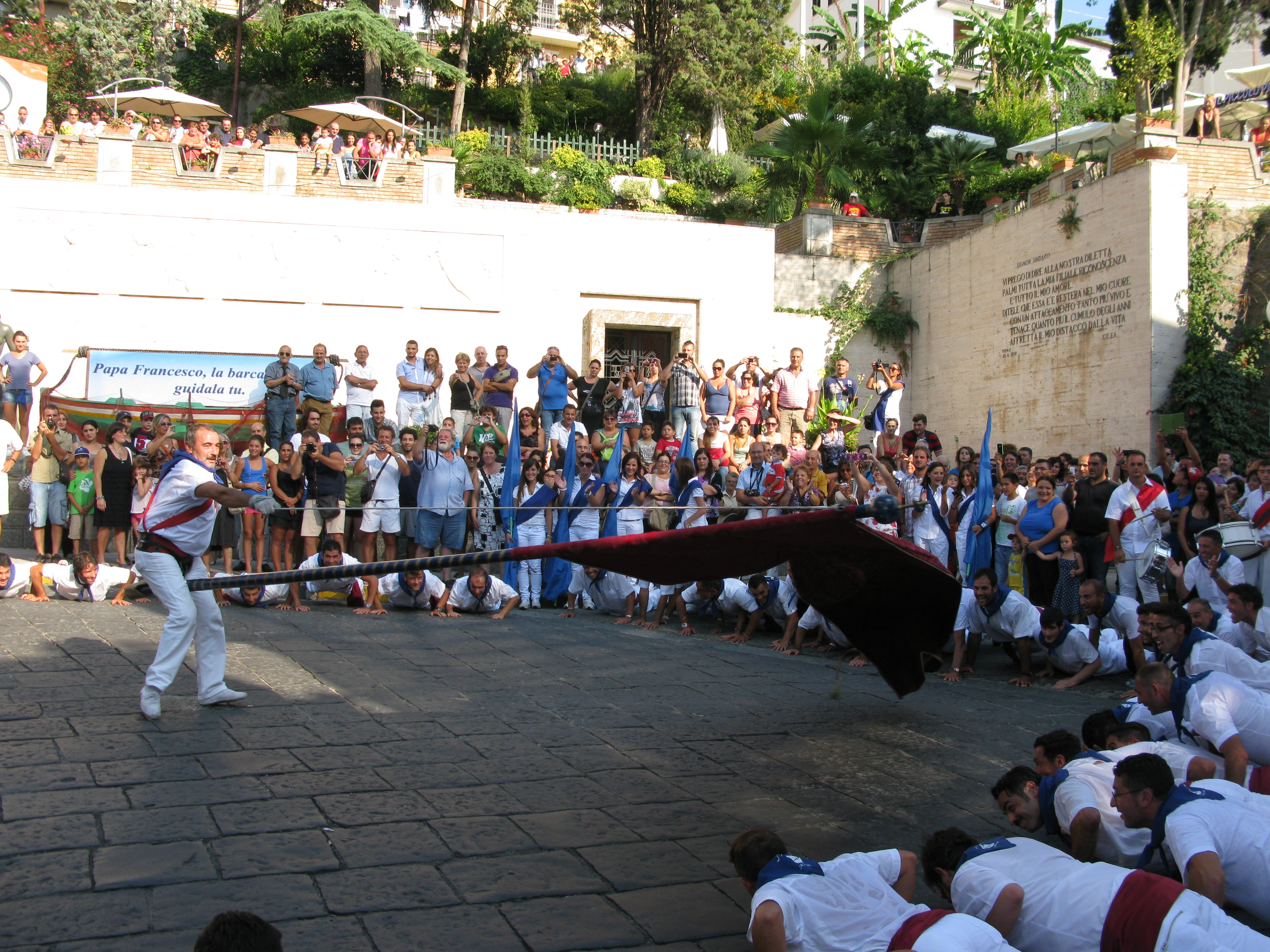 Il Drappo color cremisi è l'emblema della città di Palmi e prende il nome di Palio. Fissato su di un'asta lunga e pesante è portato da un abile portatore in grado, quando necessario, di farlo roteare e volteggiare con forza, sicurezza e destrezza.